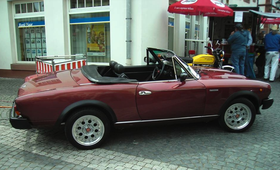 Pininfarina Volumex (1985)